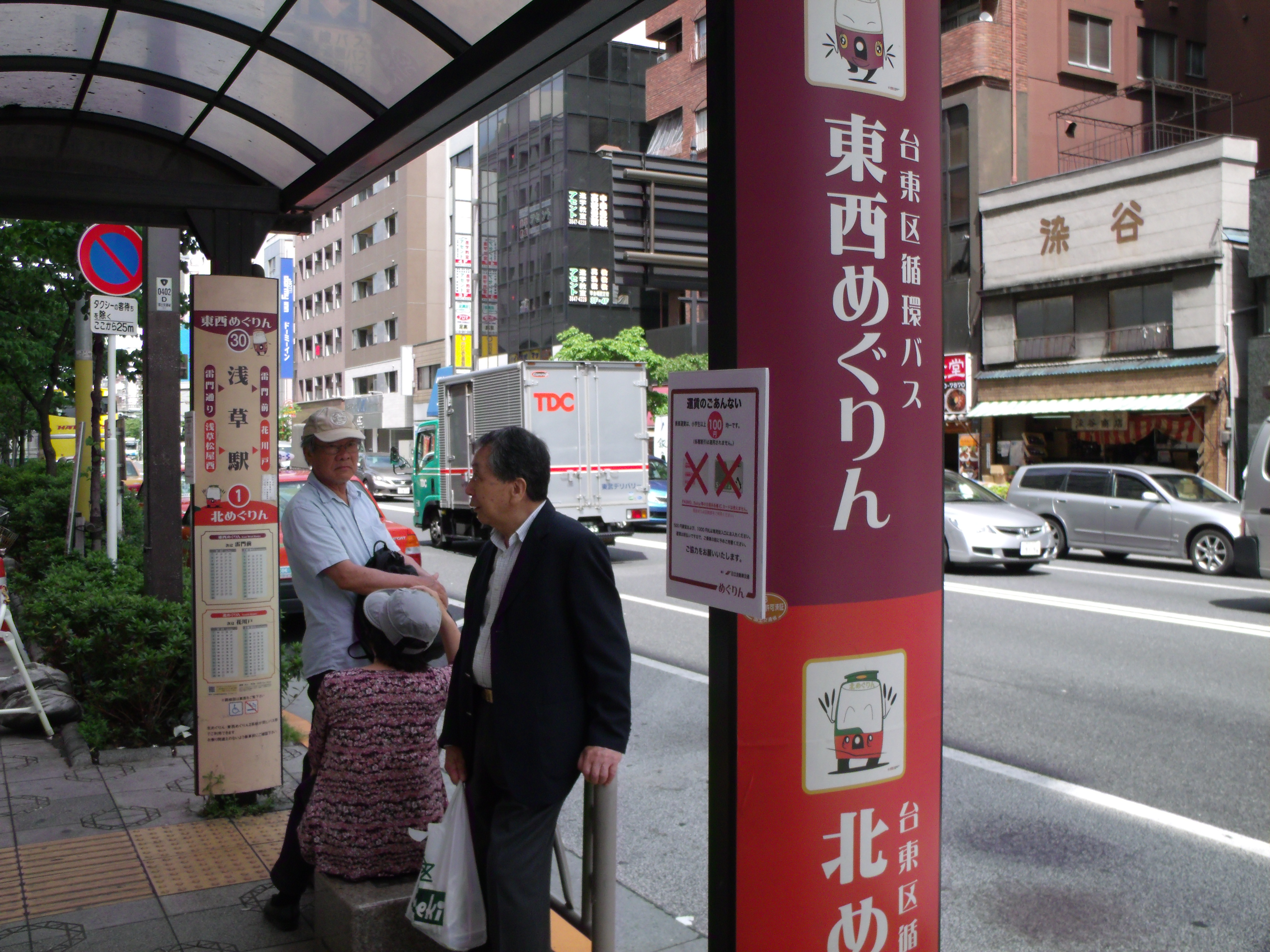 台東区循環バス「めぐりん」のバス停